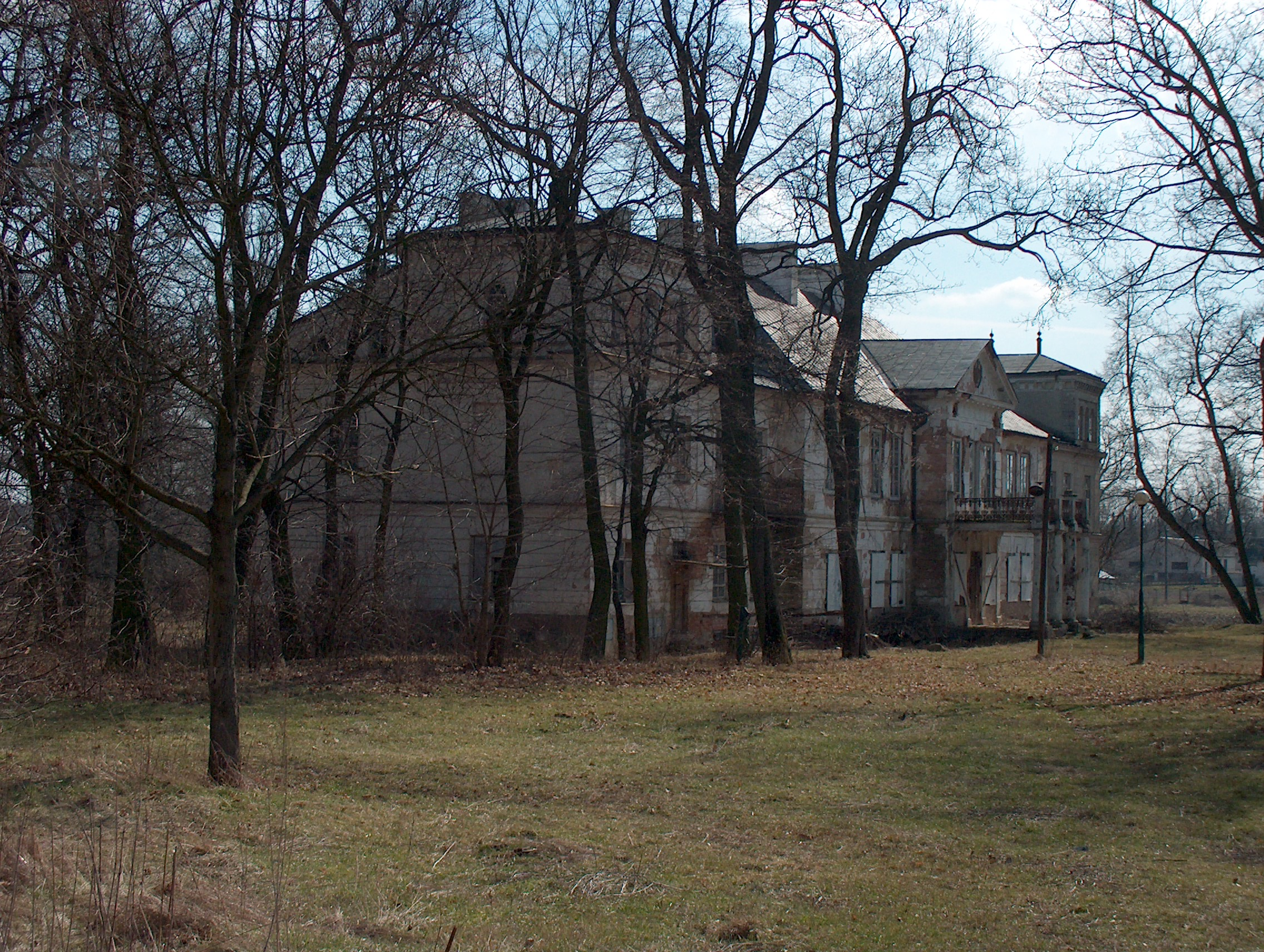 Mordy - zespół pałacowy: pałac XVIII-XIX w.